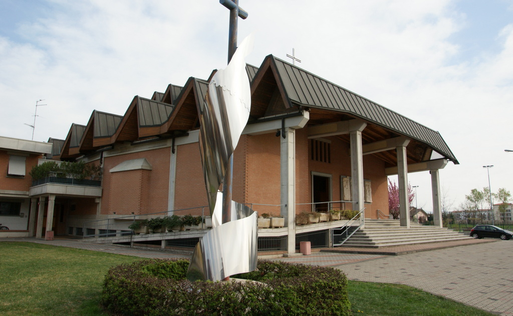 Vista della Chiesa del Beato Scalabrini